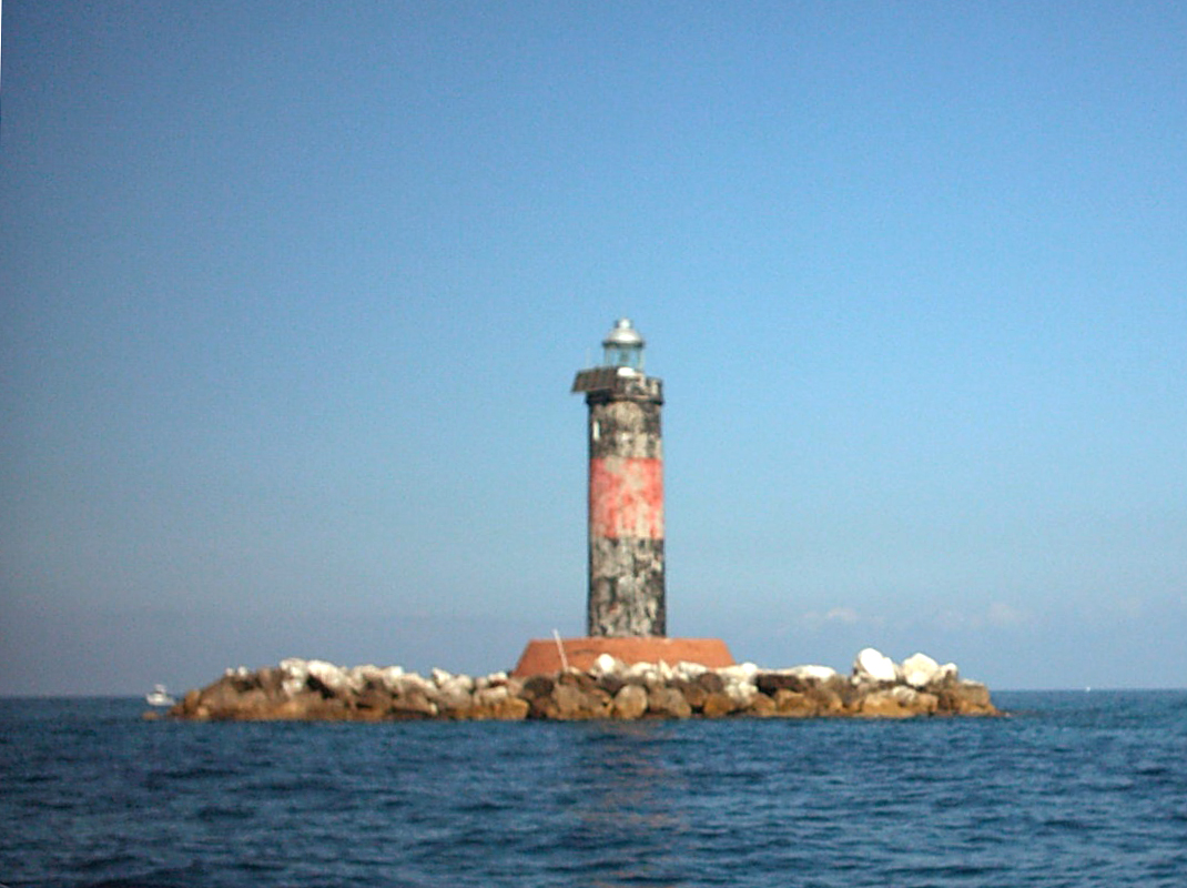 Il faro di Vada visto da una barca